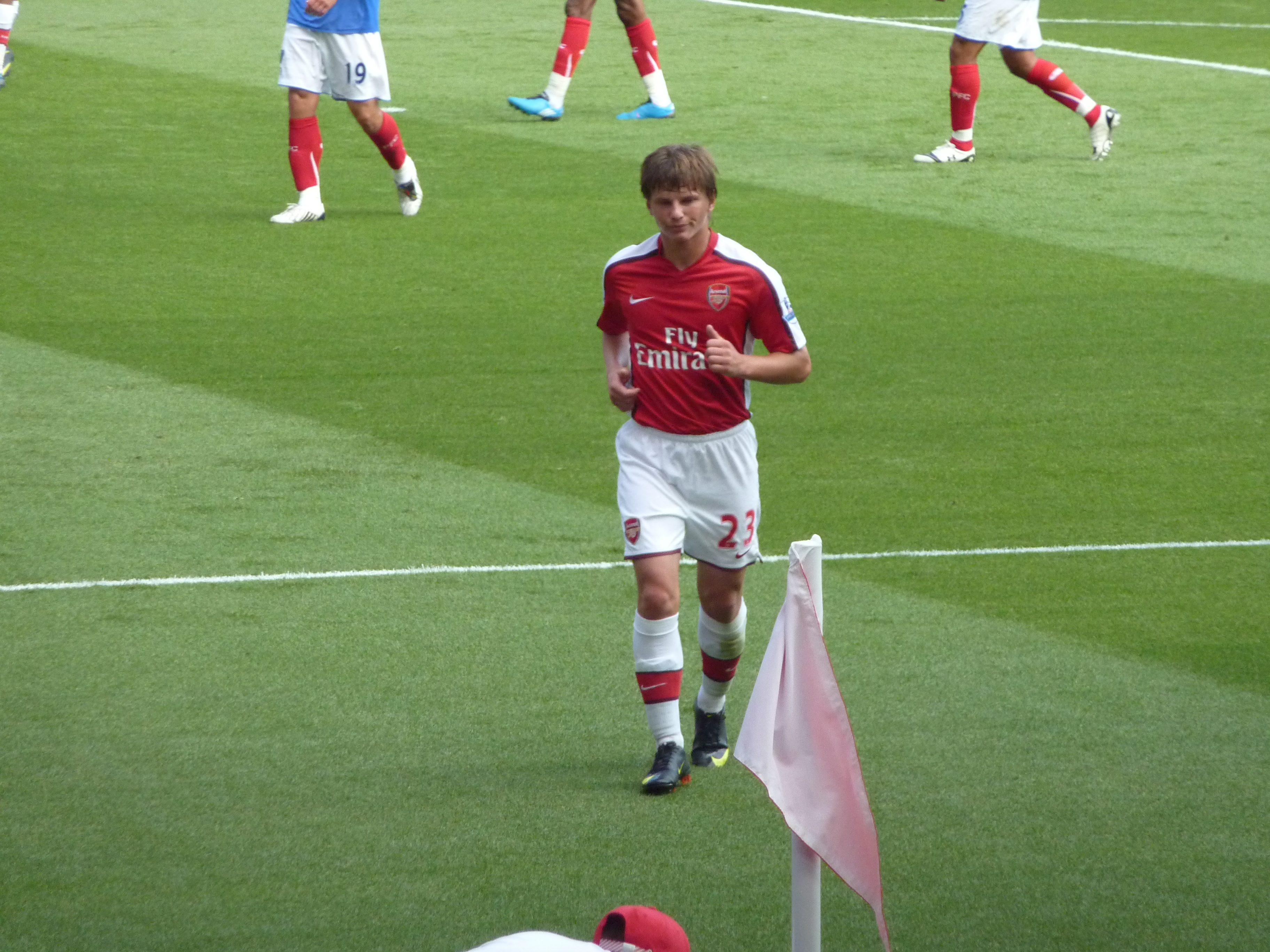 Andrei Arshavin sous les couleurs d'Arsenal